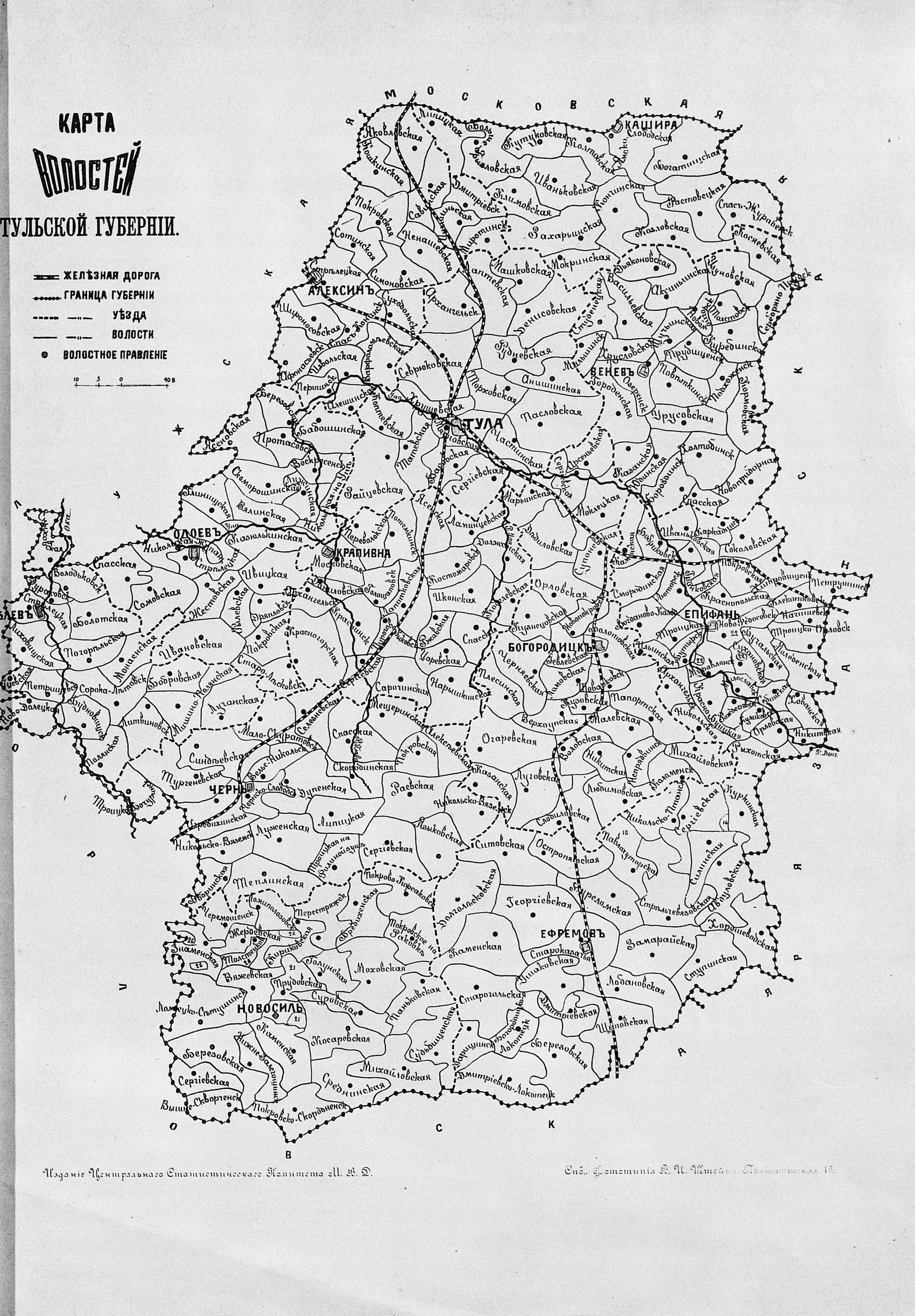 Карта волостей Тульской губернии